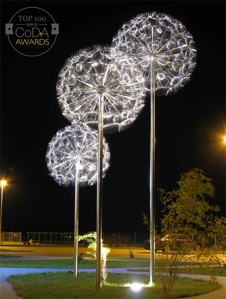 Dmuchawce stal nierdzewna kwasoodporna 7,2 x 3,5 x 2,5 [m] / 283 x 138 x 100" rok 2012 Integart Poland, Błonie k. Wrocławia rzeźba wybrana do 100 najciekawszych realizacji w przestrzeni publicznej CoD+A Awards